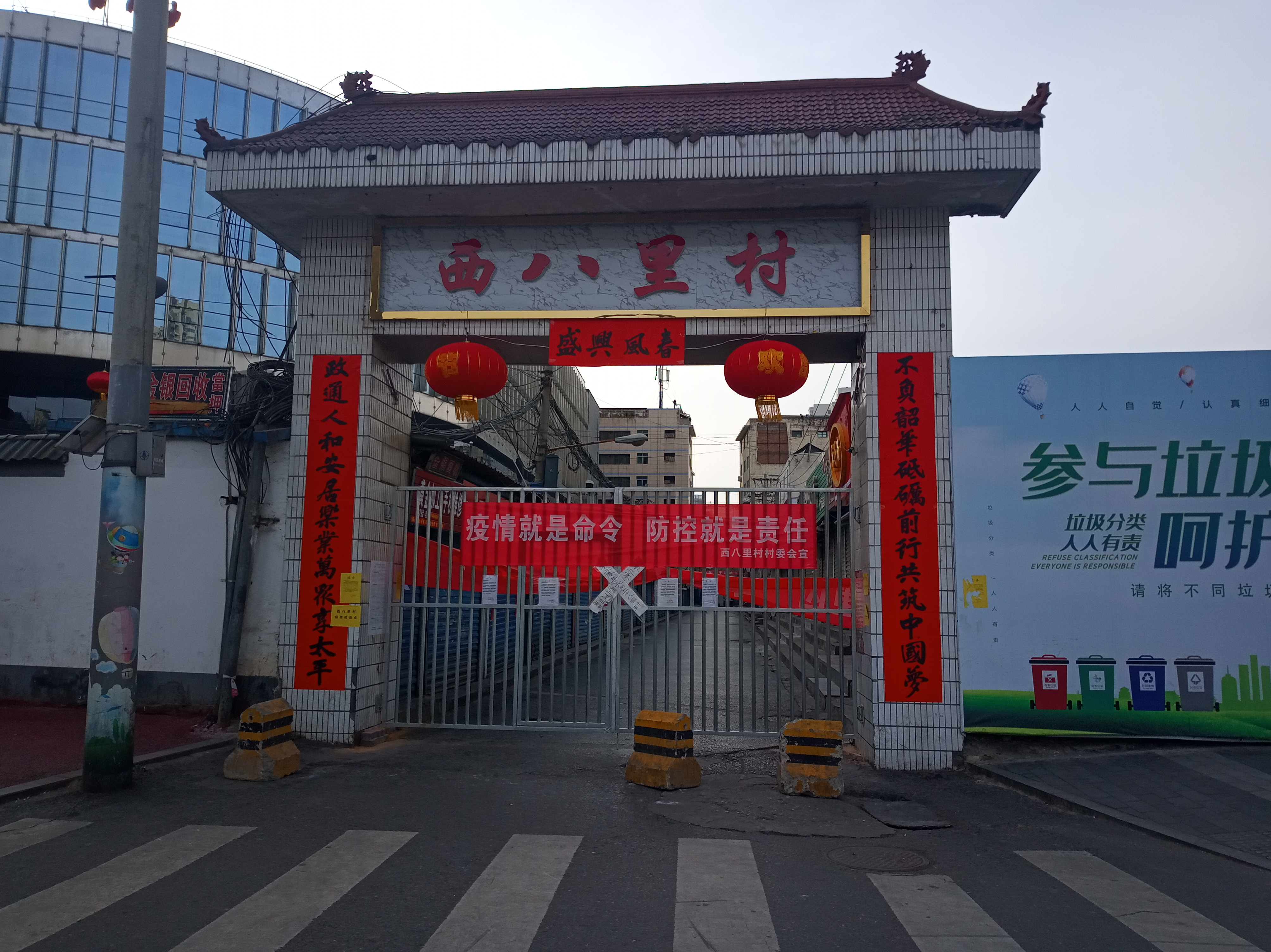 西安市雁塔区二月初已经封闭的西八里村